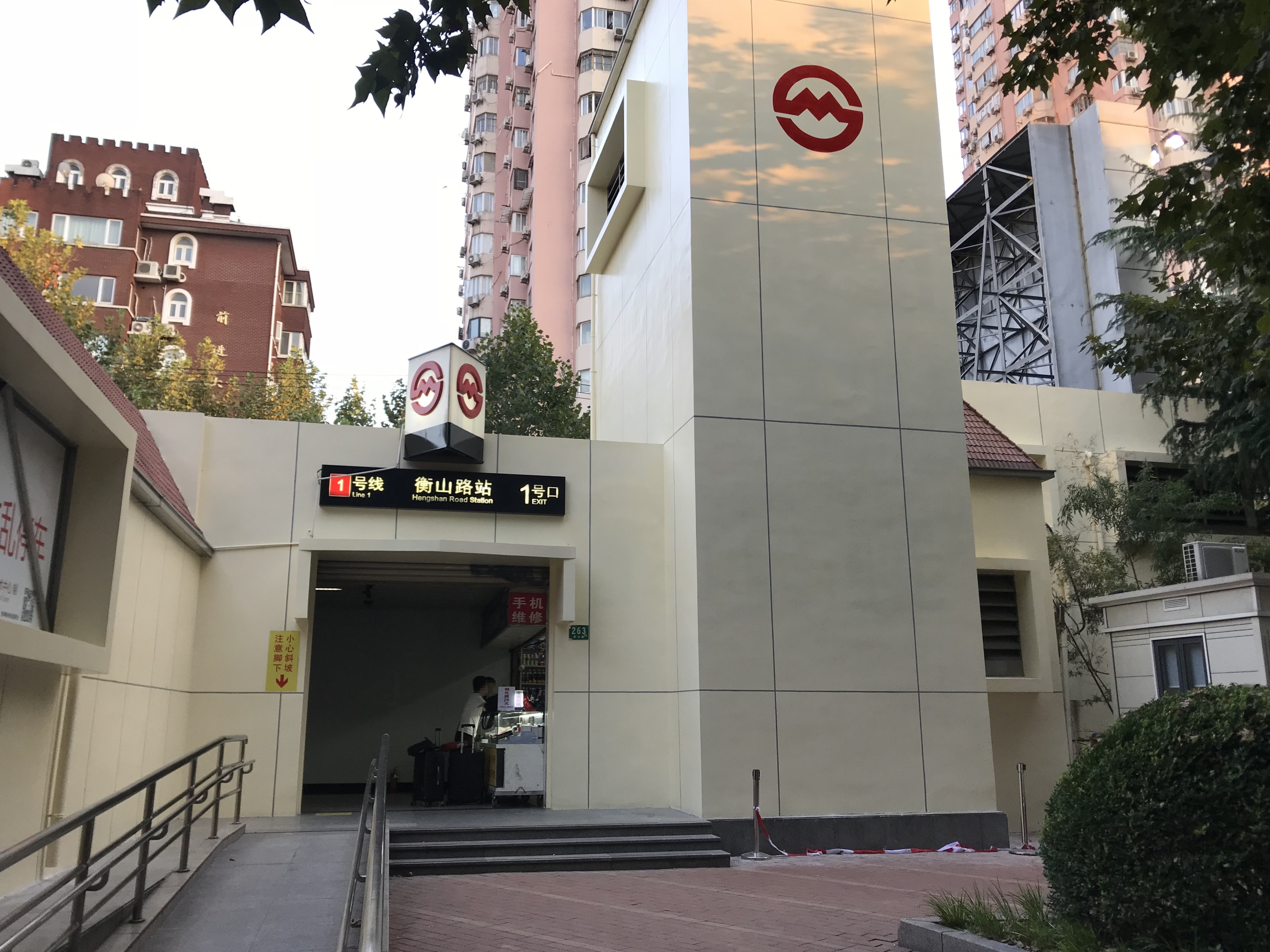 衡山路駅の1番出入り口